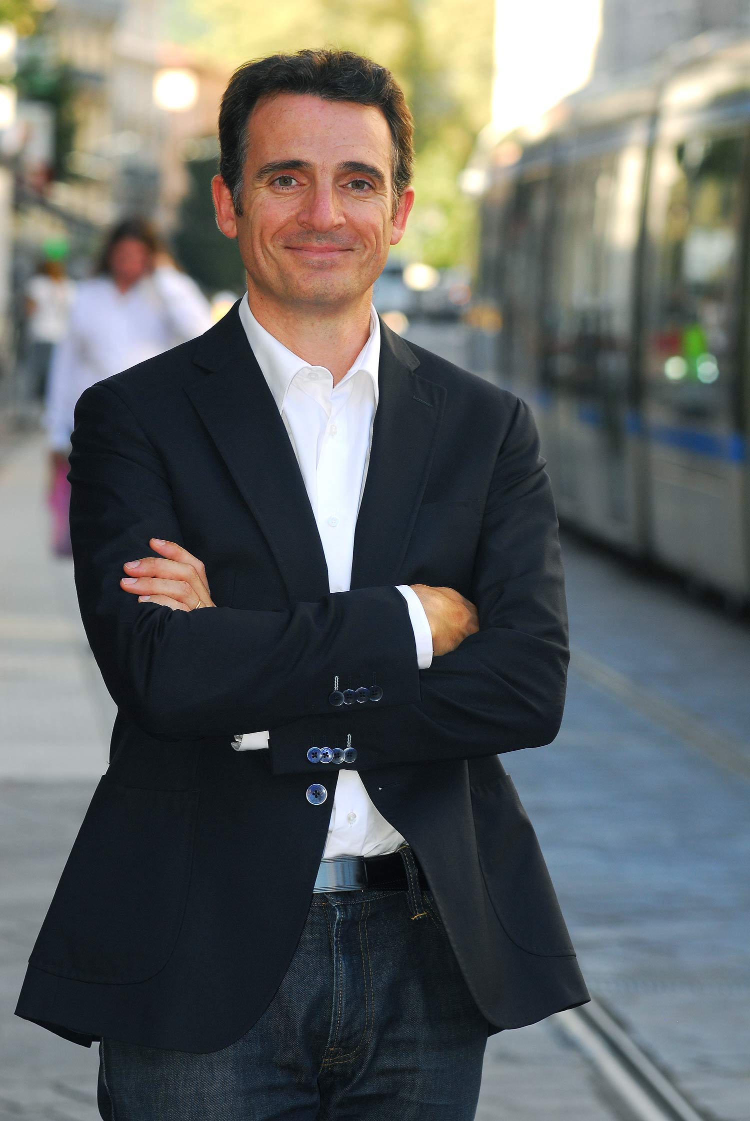 Eric Piolle candidat de Grenoble, une ville pour tous. Le rassemblement citoyen de la gauche et des écologistes. Election municipale de mars 2014 à Grenoble.